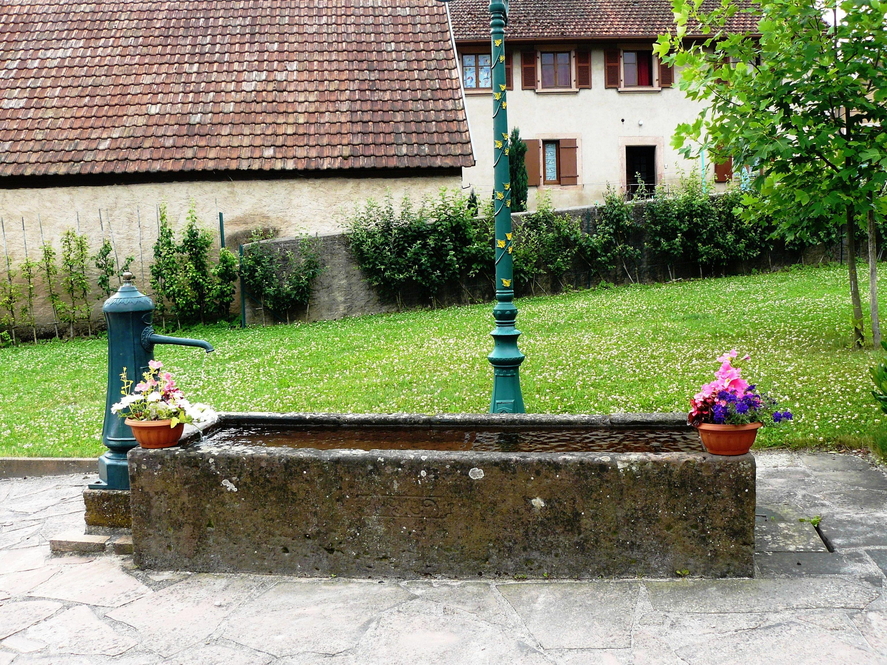 Petite fontaine au centre du village à Breitenbach